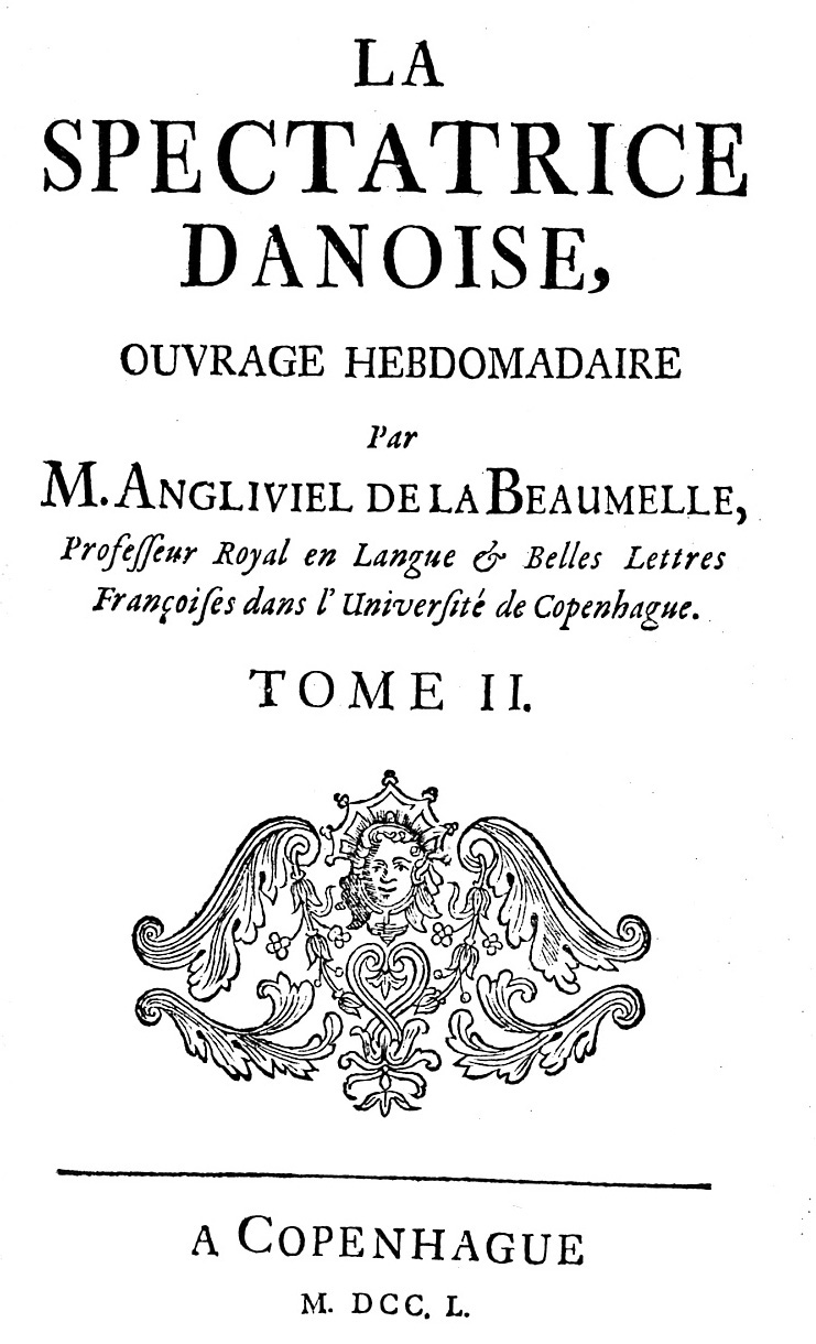 La Spectatrice danoise, périodique publié par La Beaumelle à Copenhague